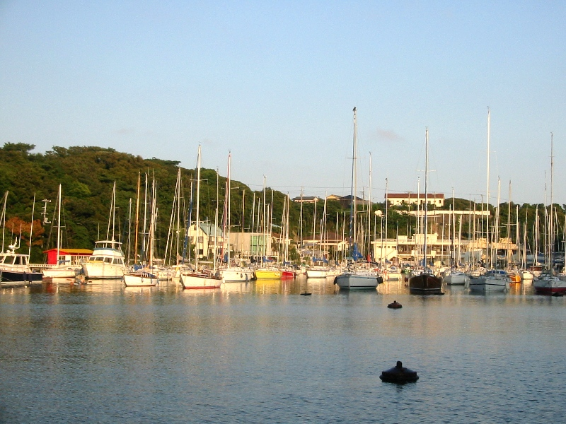 Boats in Aburatsubo, Japan. Personal photograh.